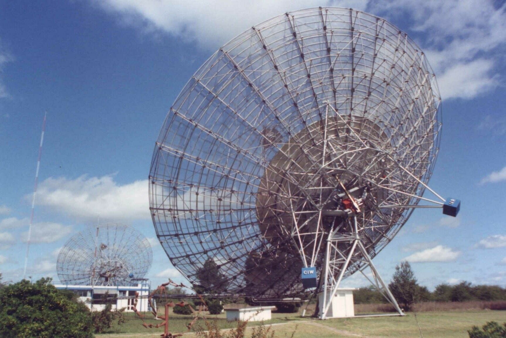 Vista de las dos antenas del IAR